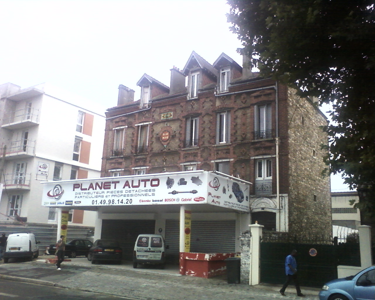 Villa Nicolas (bâti vers 1899 par Nicolas Redler l'inventeur du Billard Nicolas qui en fit un café et sa résidence à l'époque).